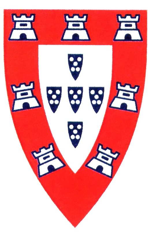 This image was copied from pt. The original description was: Descrição: (Emblema do Clube Nacional de Natação) Fonte e créditos: (Trabalho pessoal) Licença: (GFDL-self) (Consulta Copyright e direitos autorais) Atenção: Somente imagens livres para qualquer uso, sem restrição, são aceitas!